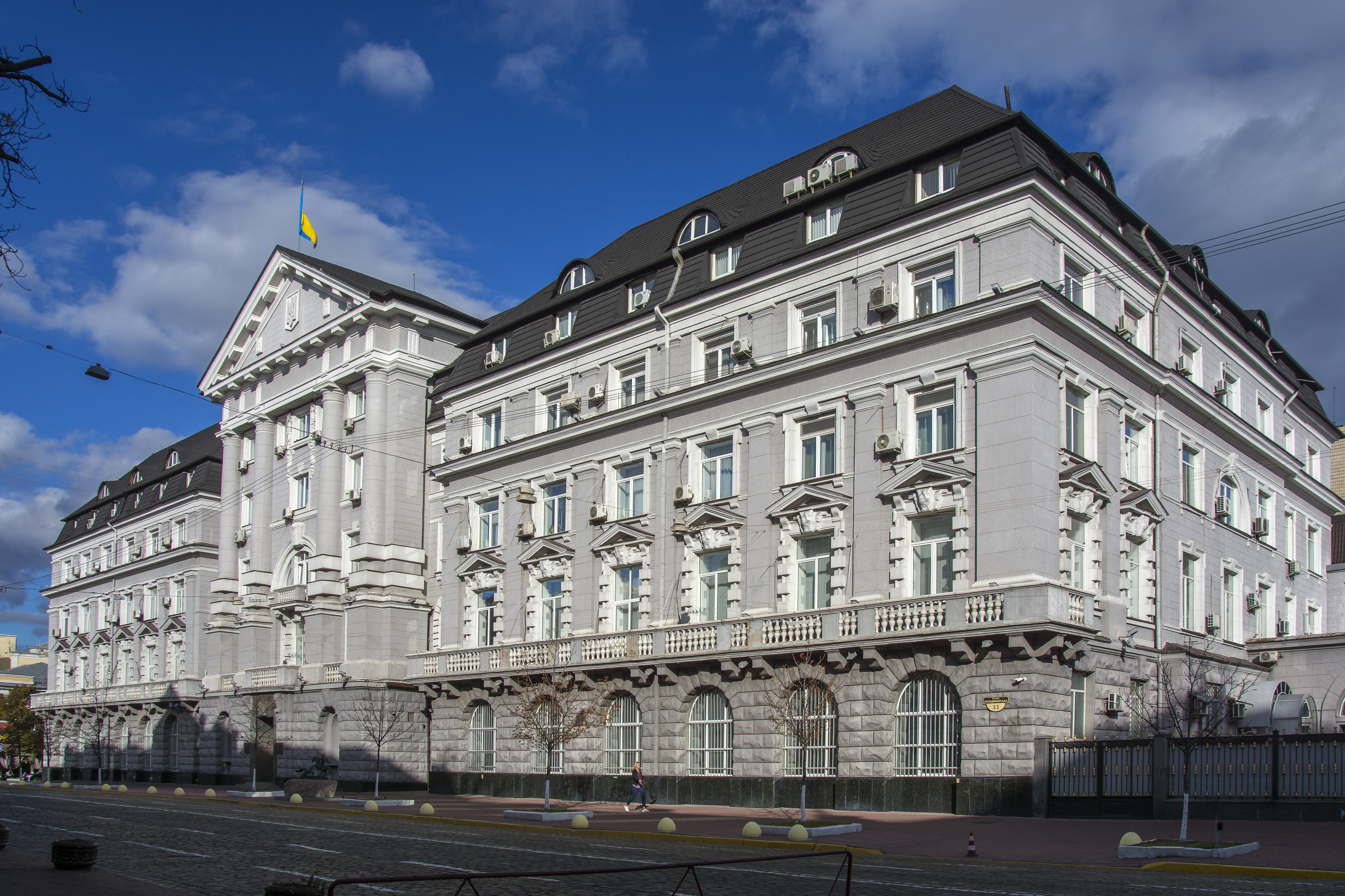 Будинок губернської земської управи, Київ, вул. Володимирська, 33